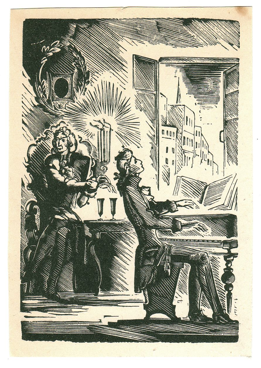 А.И.Кравченко, иллюстрация /А.С.Пушкин. "Моцарт и Сальери" /1936 г., ксилография,90х60